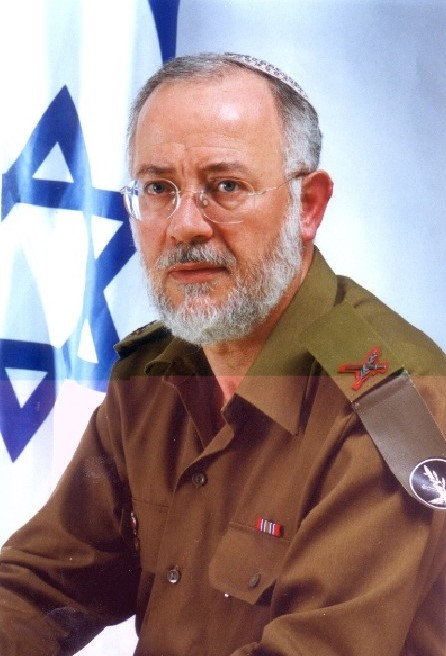 הרבצ"ר ישראל וייס